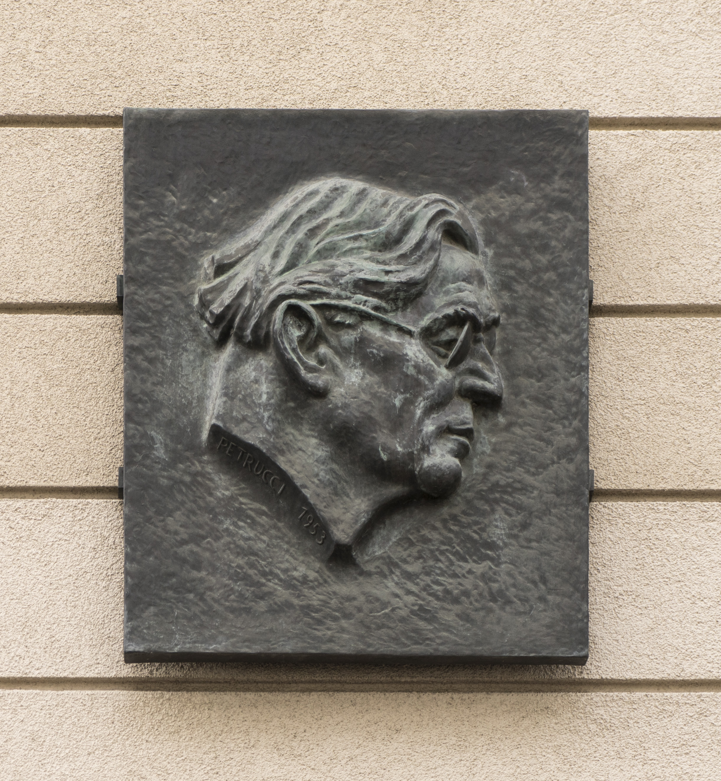 Portraitbronzebüste Karl Schönherrs von Mario Petrucci